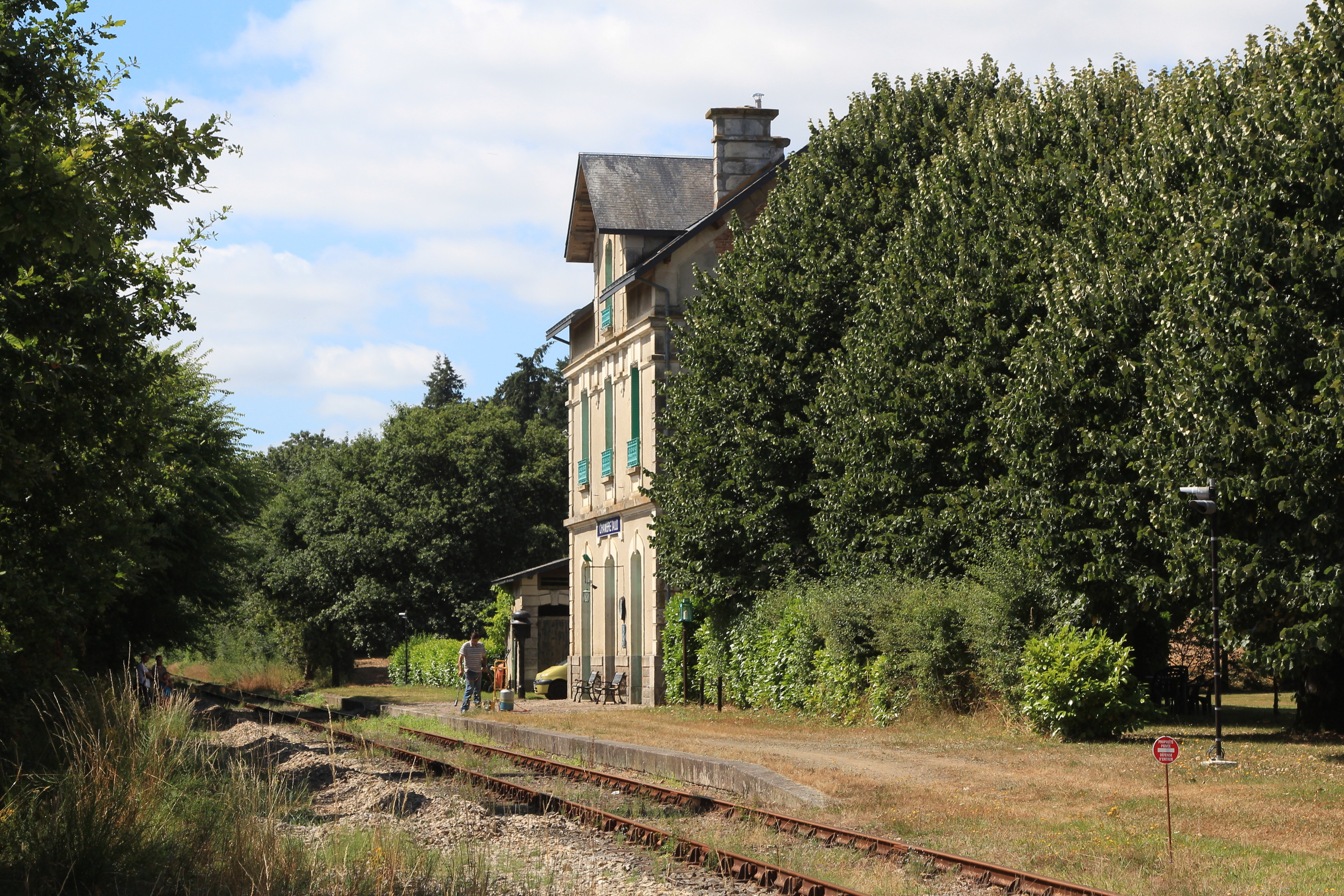 Vue de l'ancienne gare de Chambretaud.